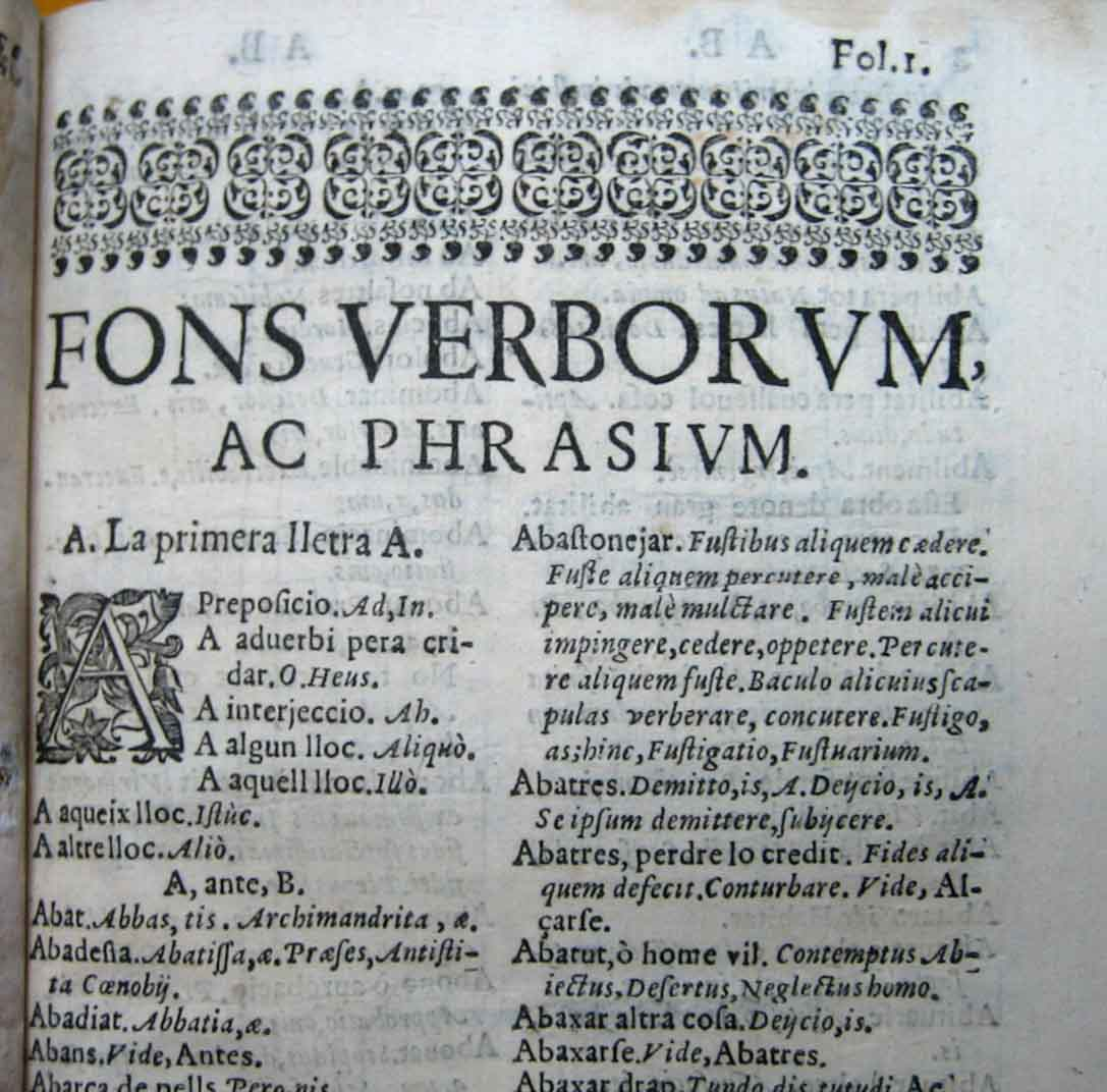 Pàgina inicial de l'obra Fons verborum et phrasium, un diccionari català-llatí, imprès a Barcelona el 1637, obra d'Antoni Font, jesuïta nascut a la Seu d'Urgell el 6 de febrer de 1610 i mort a Barcelona al 1677.